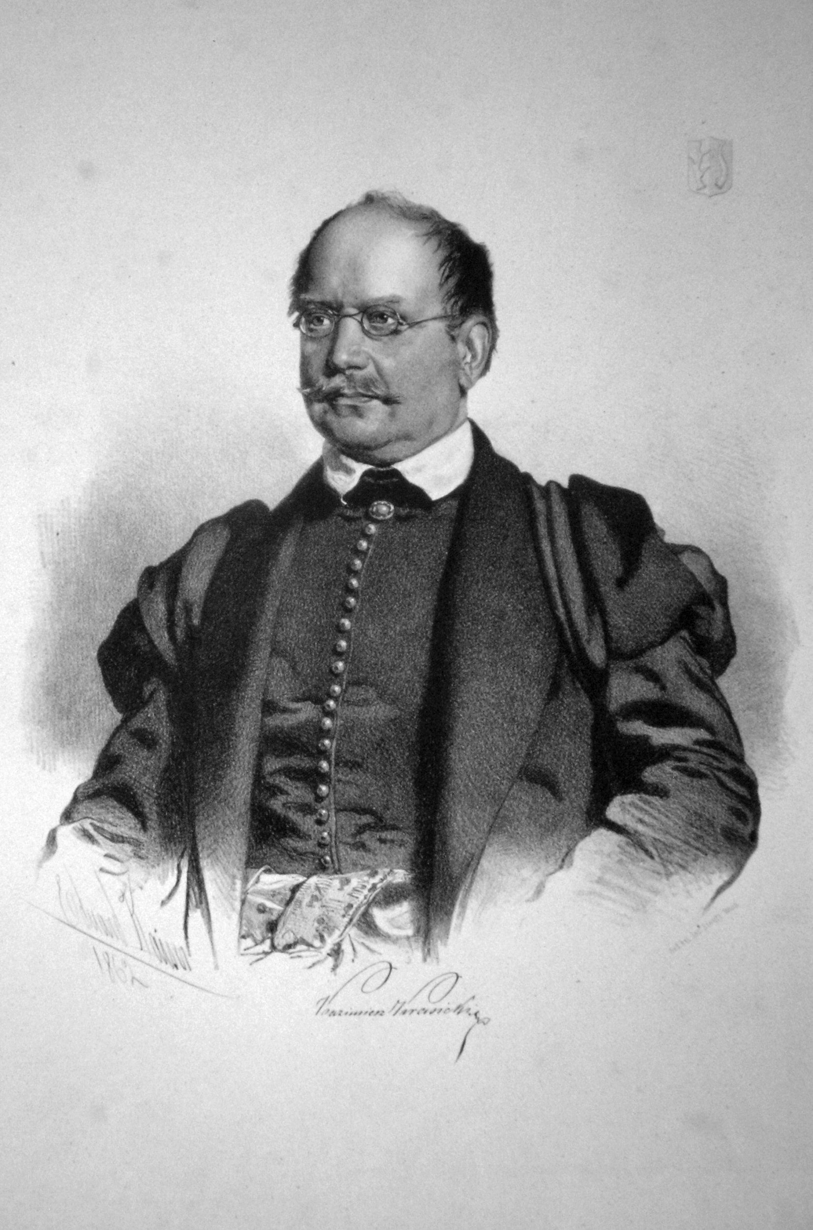 Kasimir Anton Krasicki - Siecin (1807-1882), Graf, Polnischer Großgrundbesitzer. Lithographie von Eduard Kaiser, 1862